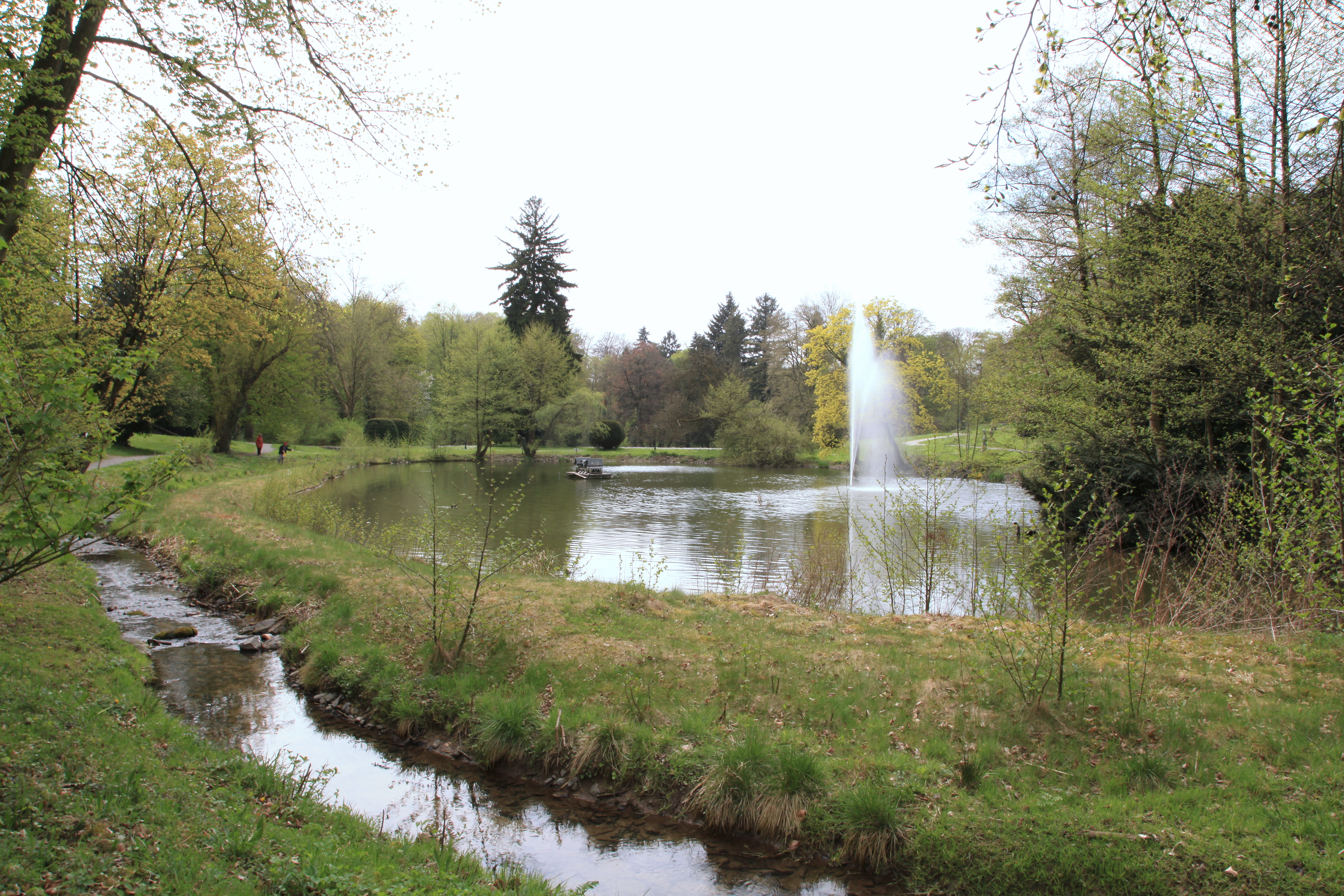 Schlosspark von Schloss Lerbach mit Teich und Lerbach, Lerbacher Weg in Bergisch Gladbach